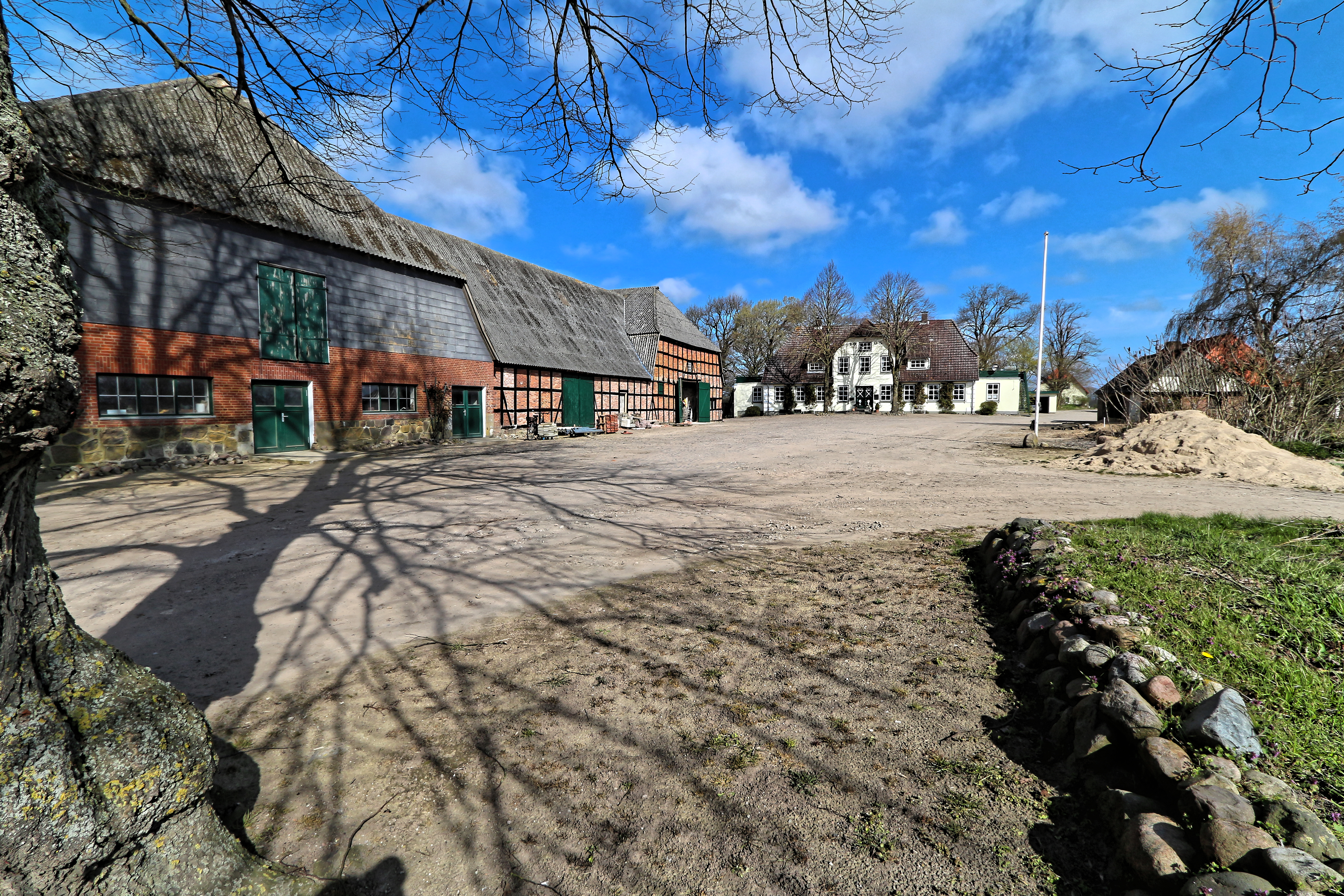 Hasselberg, Kieholmhof 1; Hofanlage